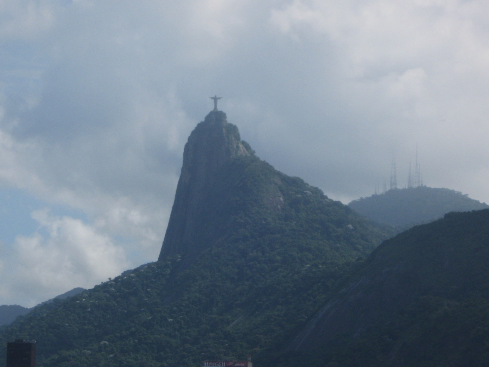 Cristo Redentor visto da Urca.